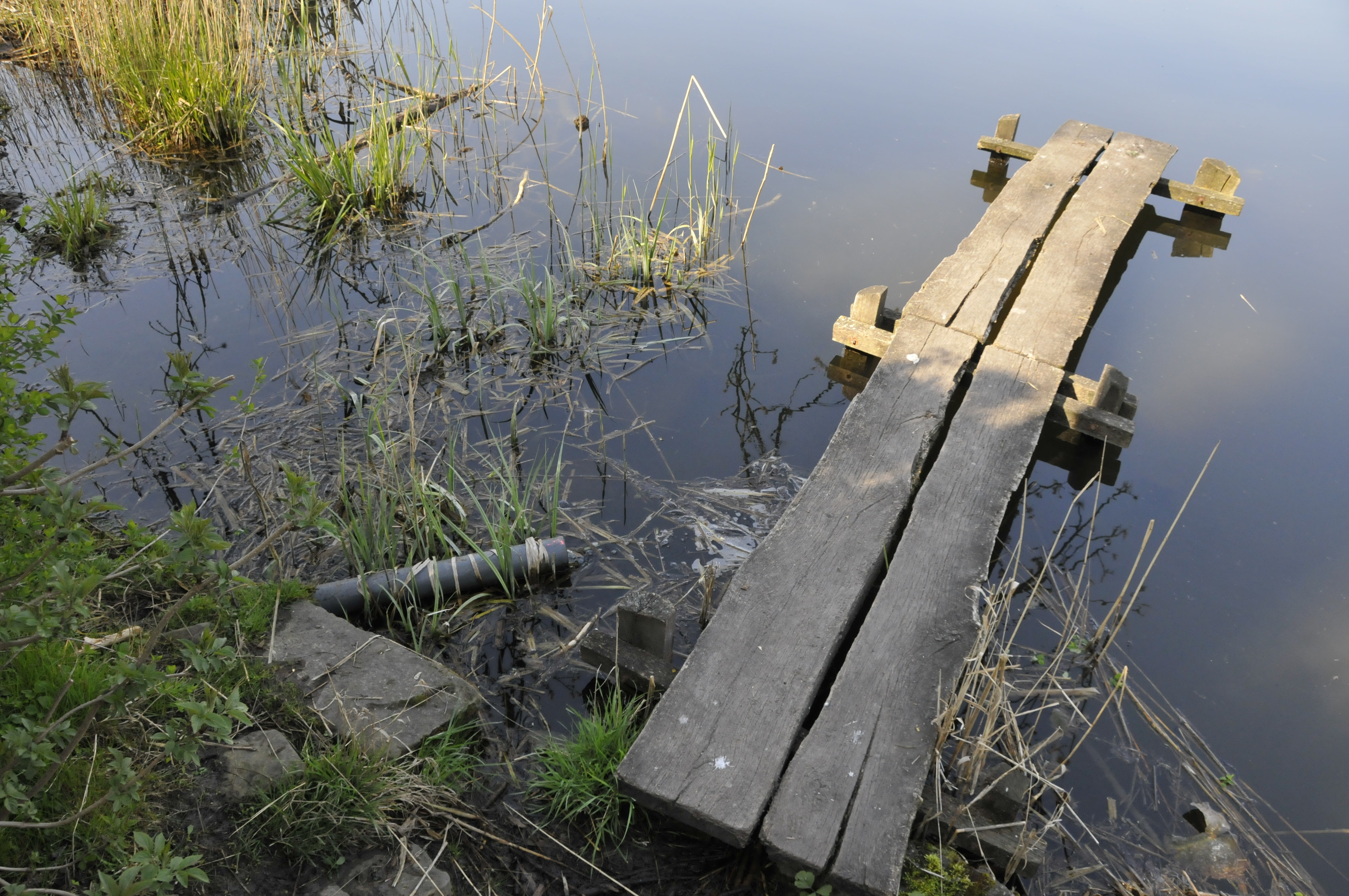 Bootssteg am Siebleber Teich